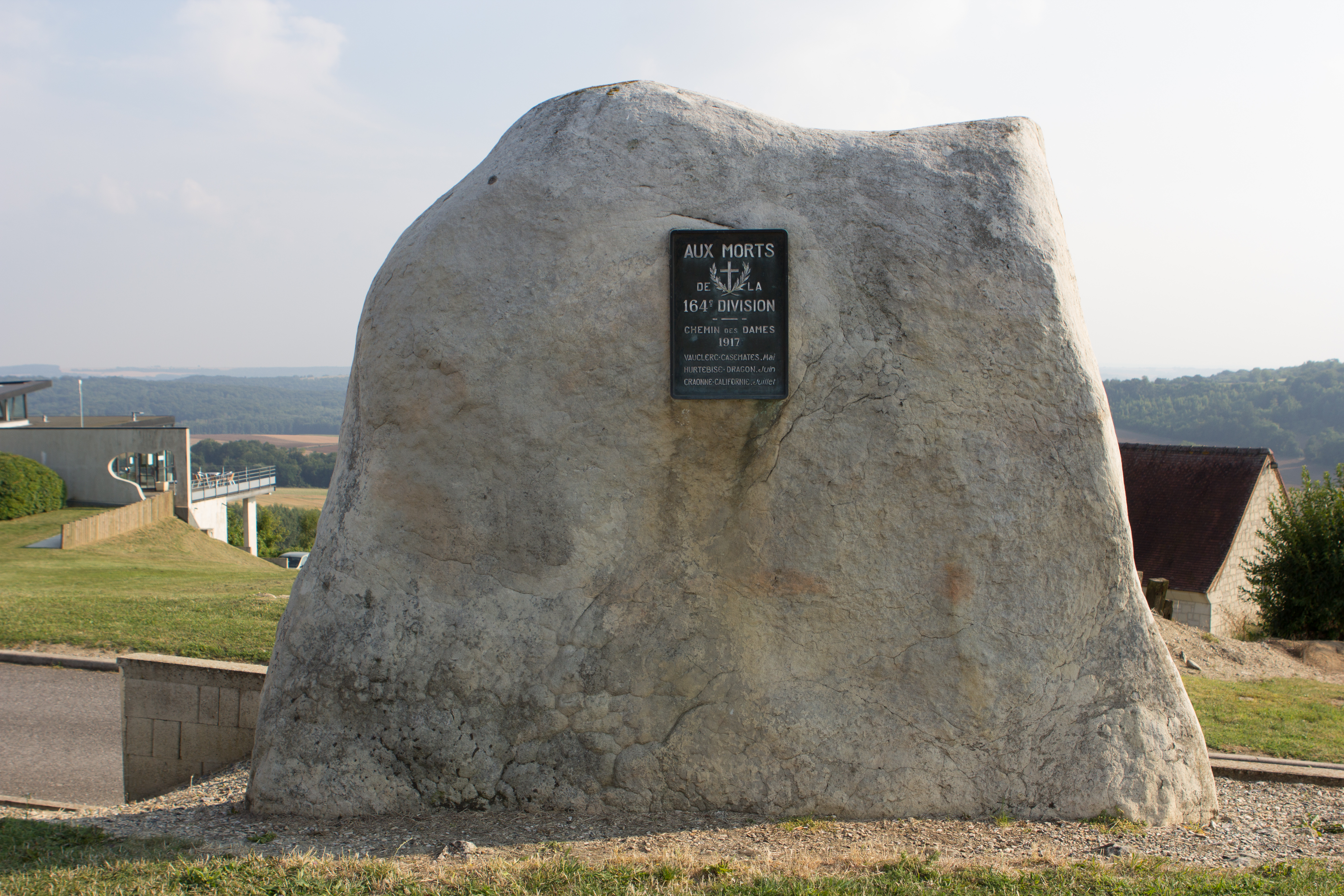 La caverne du Dragon, Chemin des Dames, commune d'Oulches-la-Vallée-Foulon, Aisnes, France